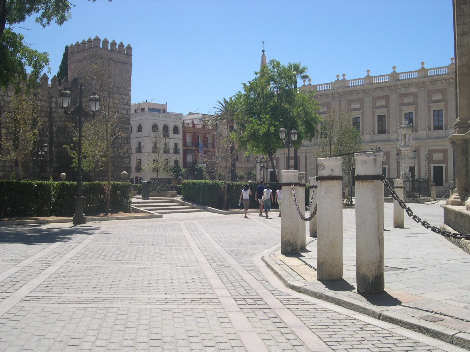 Murallas des Alcázar y Archivo de Indias en la Plaza del Triunfo, Sevilla (España)